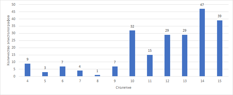 Количество византийских эпистолографов по столетиям. Данные из Taken from M. GRÜNBART, “Byzantinische Briefflorilegien: Kopieren und Sammeln zur Zeit der Makedonenkaiser”, in: Encyclopedic Trends in Byzantium? Proceedings of the International Conference Held in Leuven, 6-8 May 2009, ed. P. VAN DEUN and C. MACÉ (Leuven, 2011: Orientalia Lovaniensia analecta 212), pp. 77-88